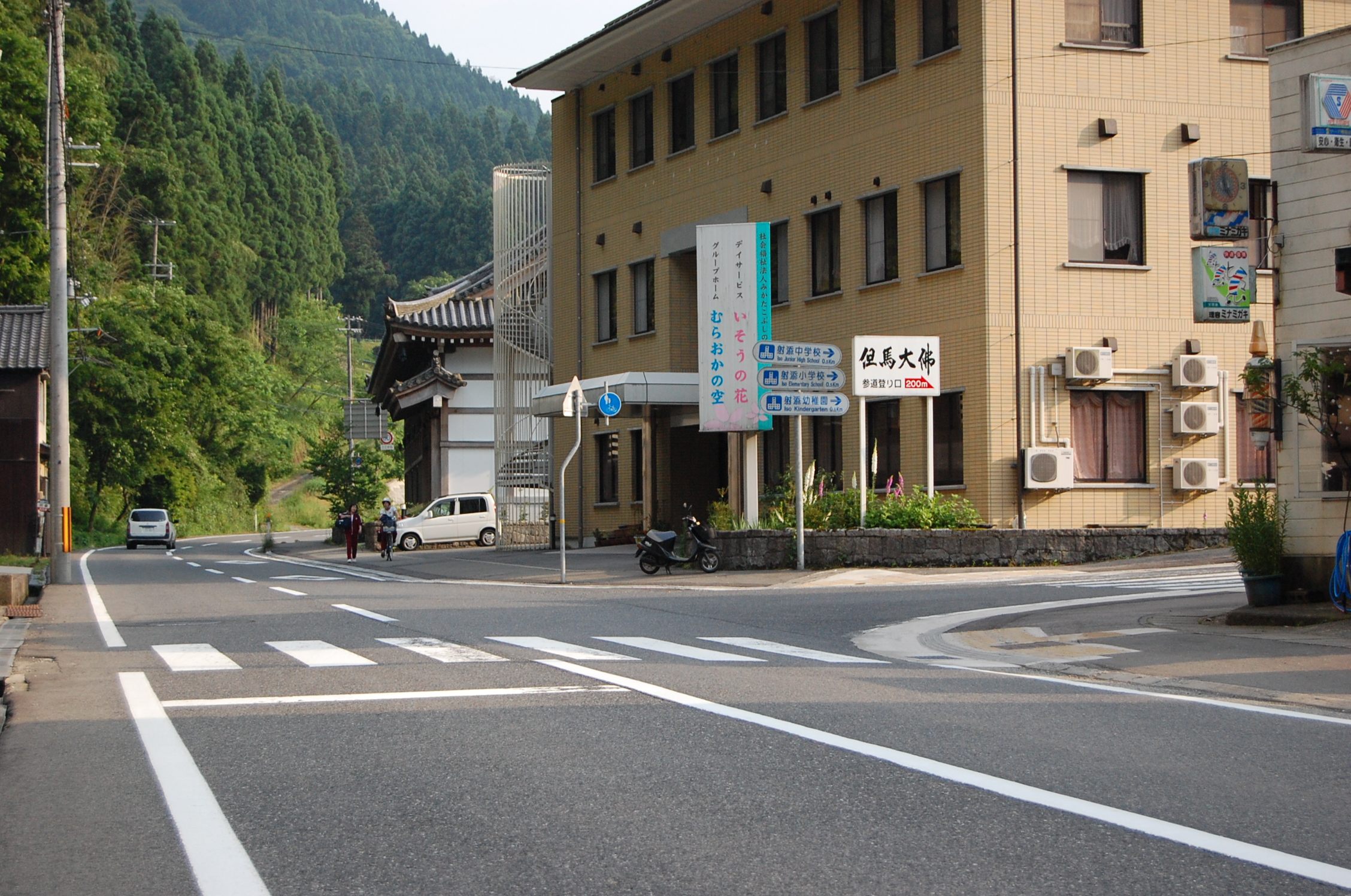 兵庫県道266号川会入江線。起点の川会。